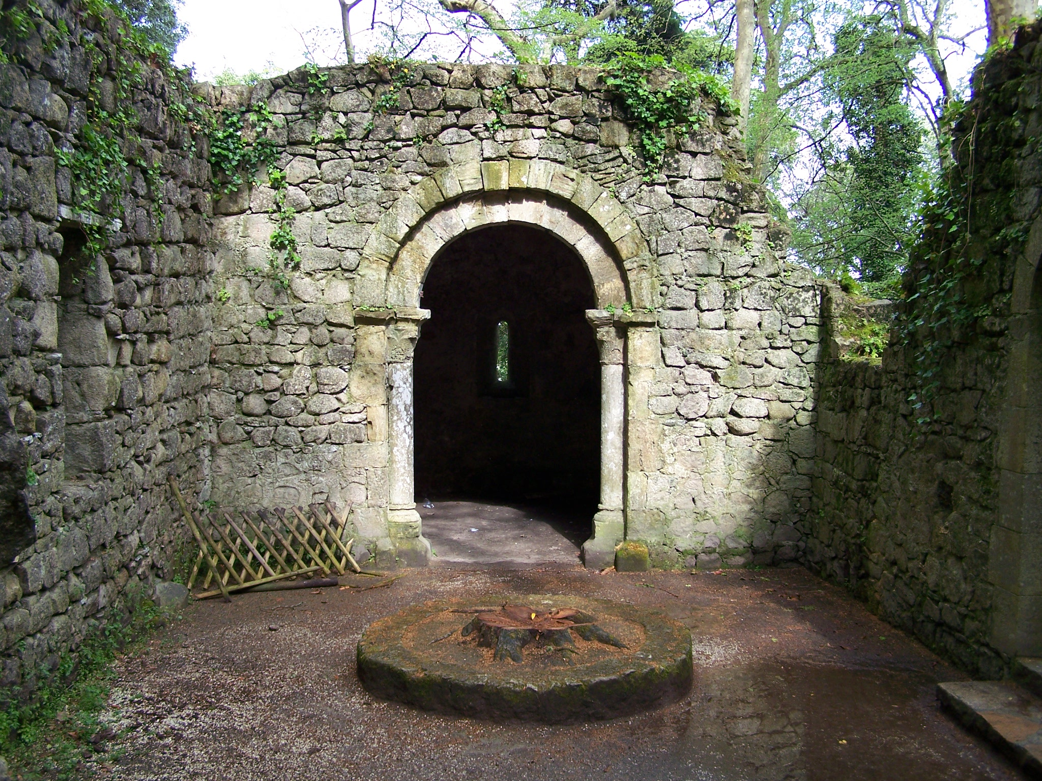 Castelo dos Mouros em Sintra, Portugal. Capela de São Pedro de Canaferrim.